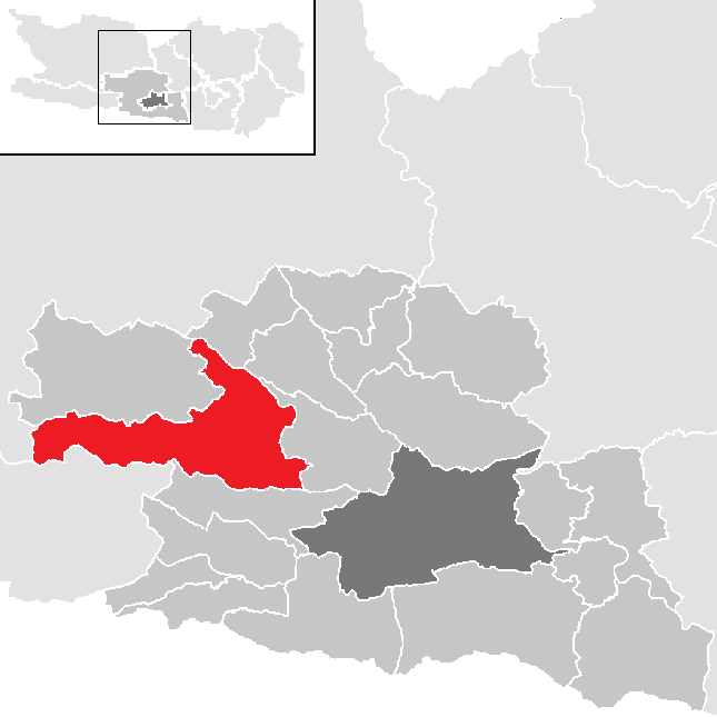 Bezirk Villach-Land